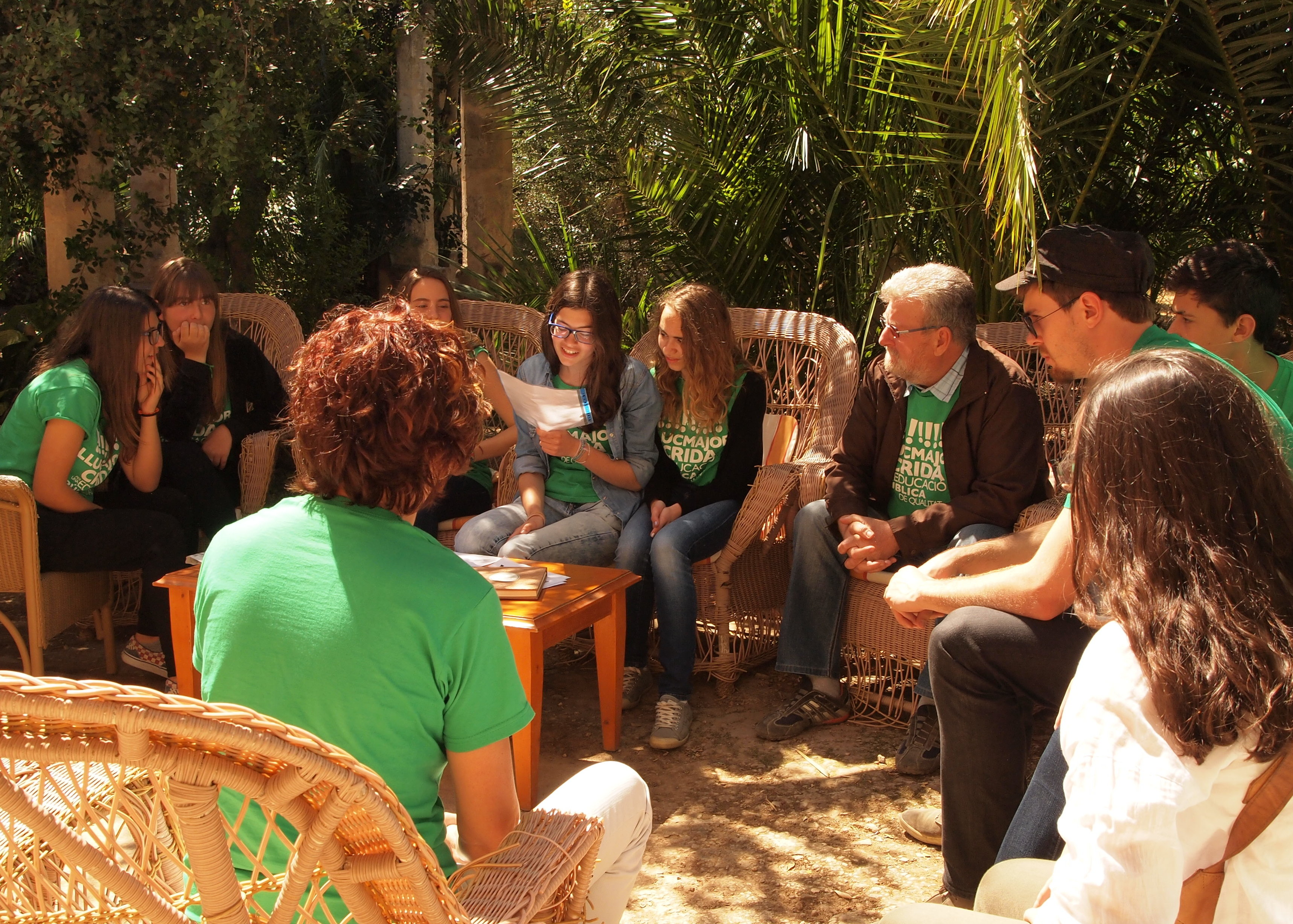 Jaume Sastre i Font, rodejat dels seus alumnes de l'IES Llucmajor durant la seva vaga de fam en defensa d'una educació de qualitat en català a Sa Casa Llarga.